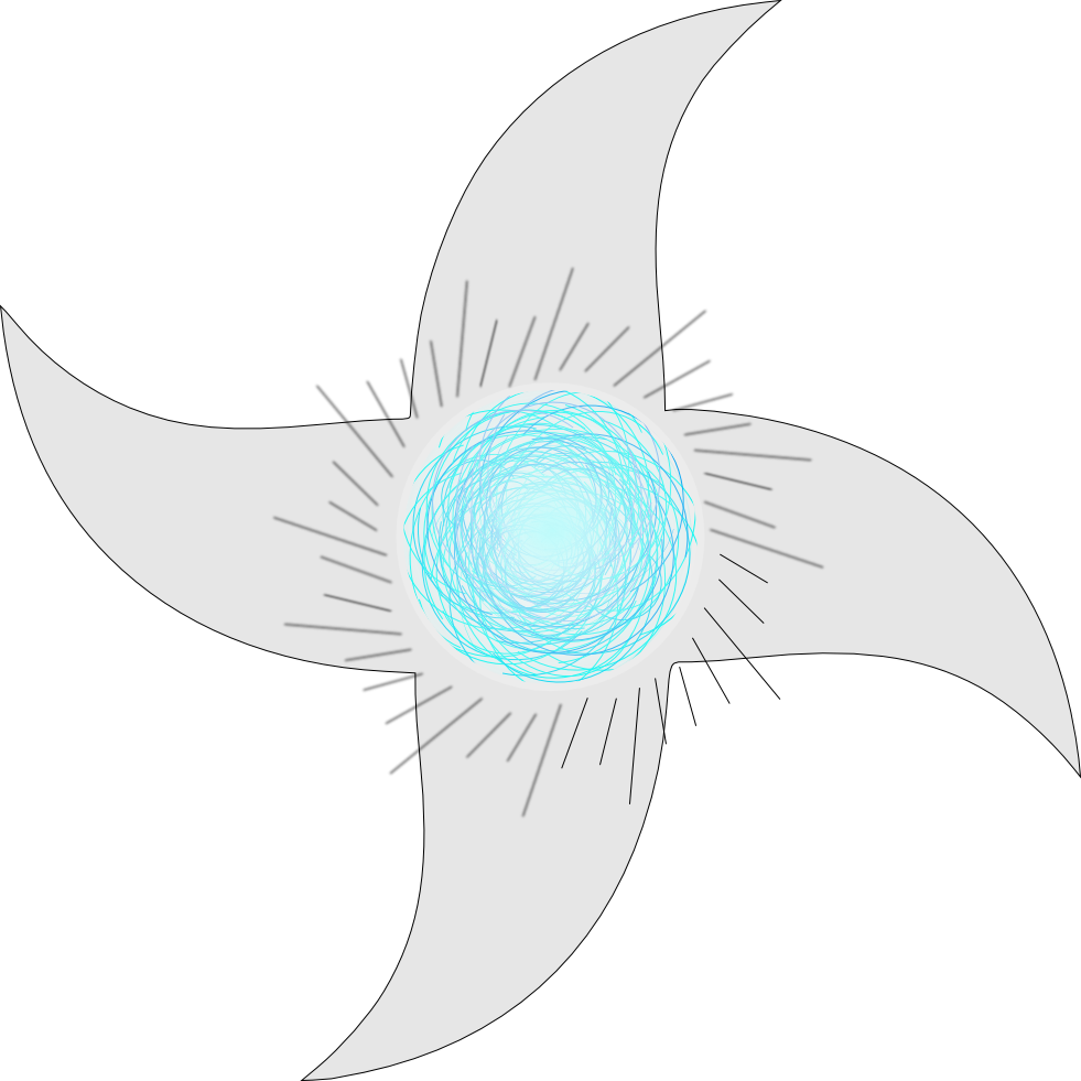 le shuriken tourbillonnant de naruto